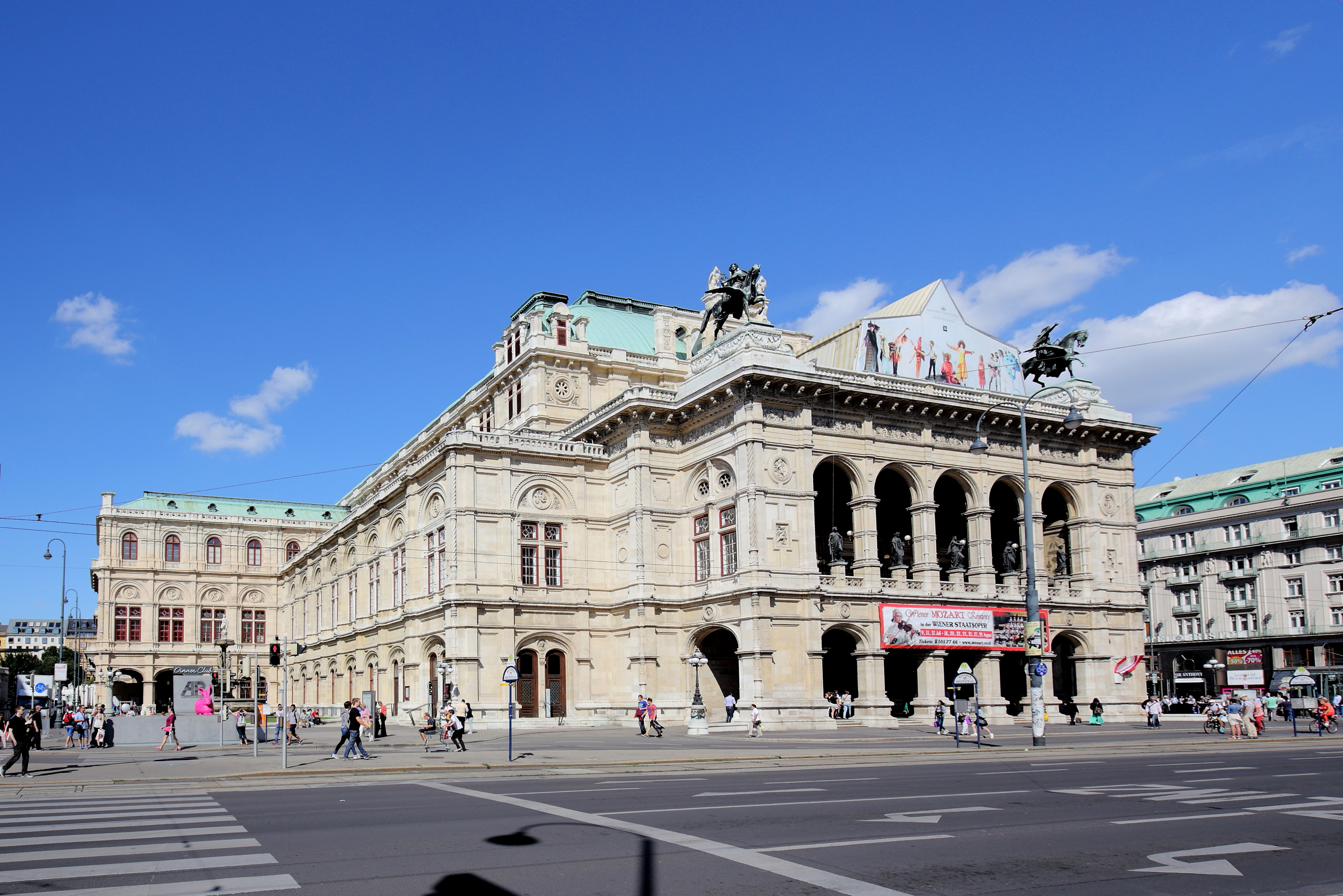 Südwestansicht der Wiener Staatsoper (vom Opern Ring). Das Opernhaus wurde ab Ende 1861 nach Plänen der Architekten August Sicard von Sicardsburg und Eduard van der Nüll im Stil der Neorenaissance errichtet. Nach amerikanischen Bombardements am 12. März 1945 geriet das Operngebäude in Brand und wurde gleich nach dem Krieg wieder aufgebaut.